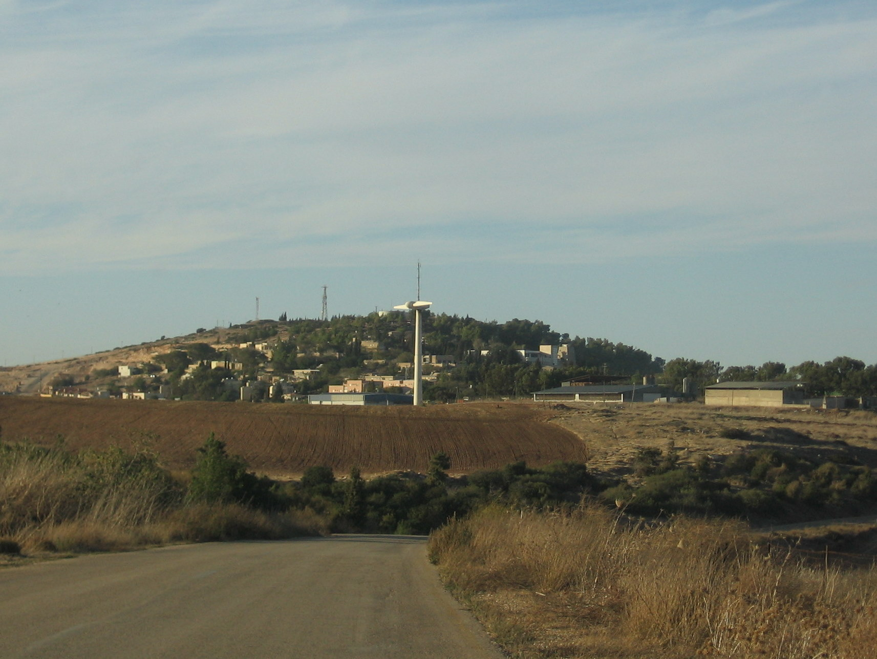 מעלה גלבוע